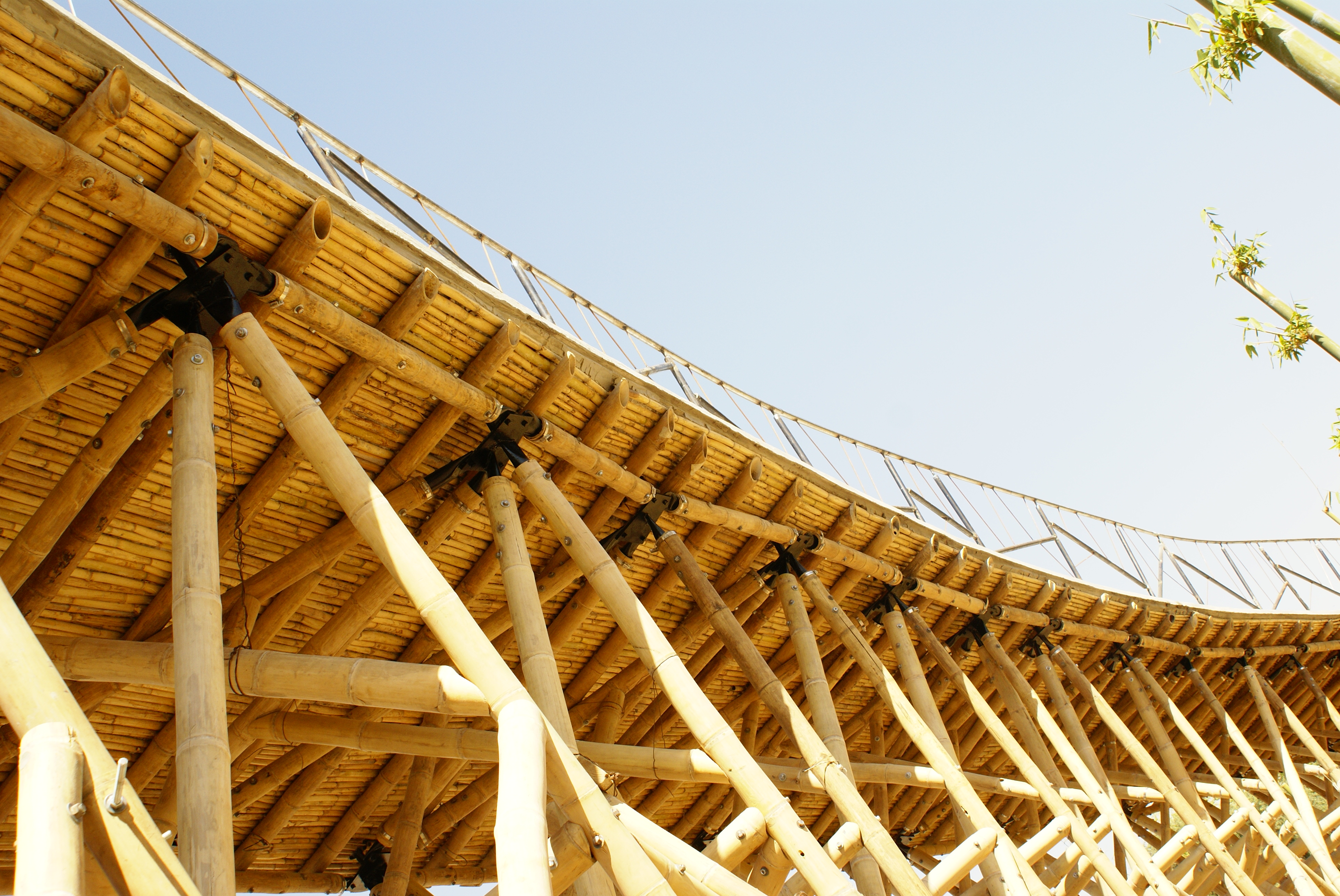 Estructura que crea un paso elevado entre un futuro bosque de bambú en la ciudad de Puebla, México